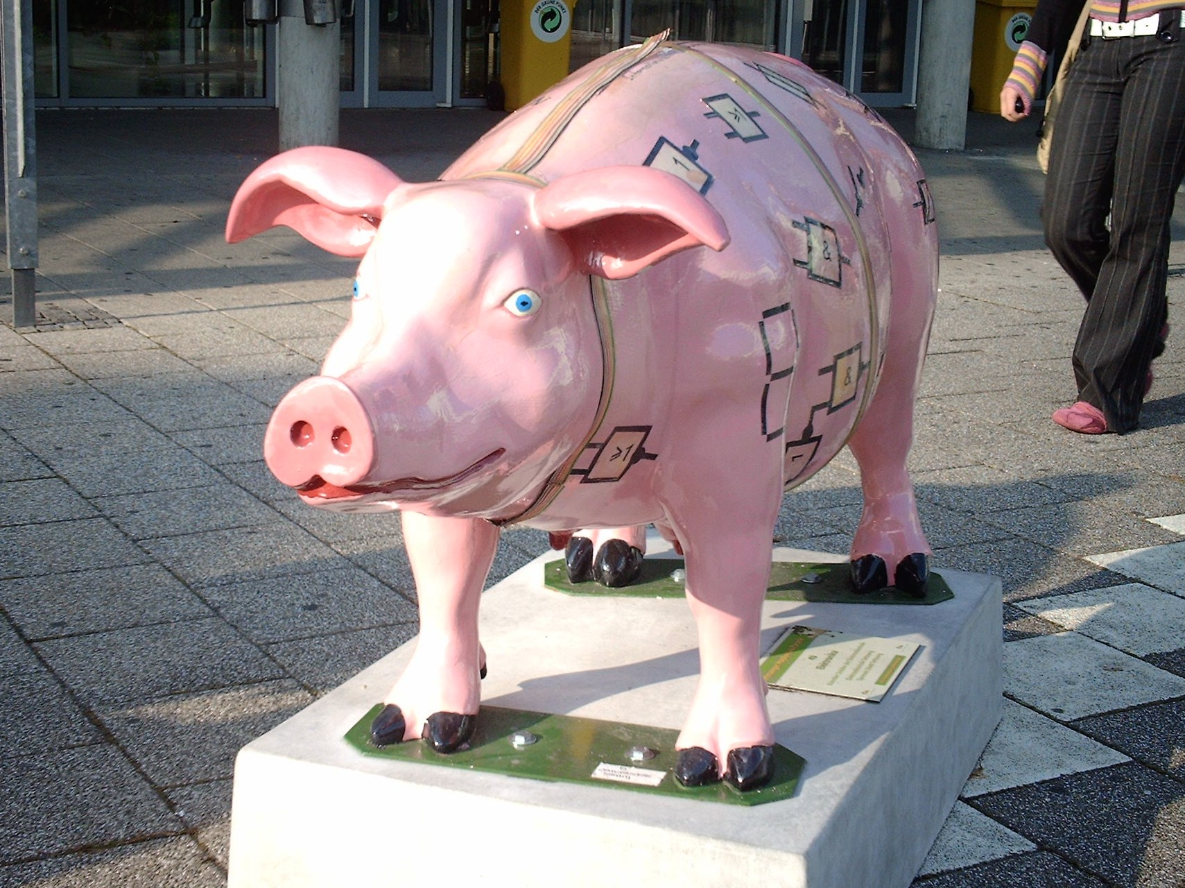 Malowana świnia w Tettnang